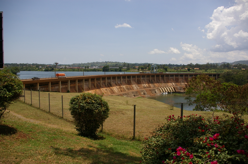 Owen Falls Dam, Uganda